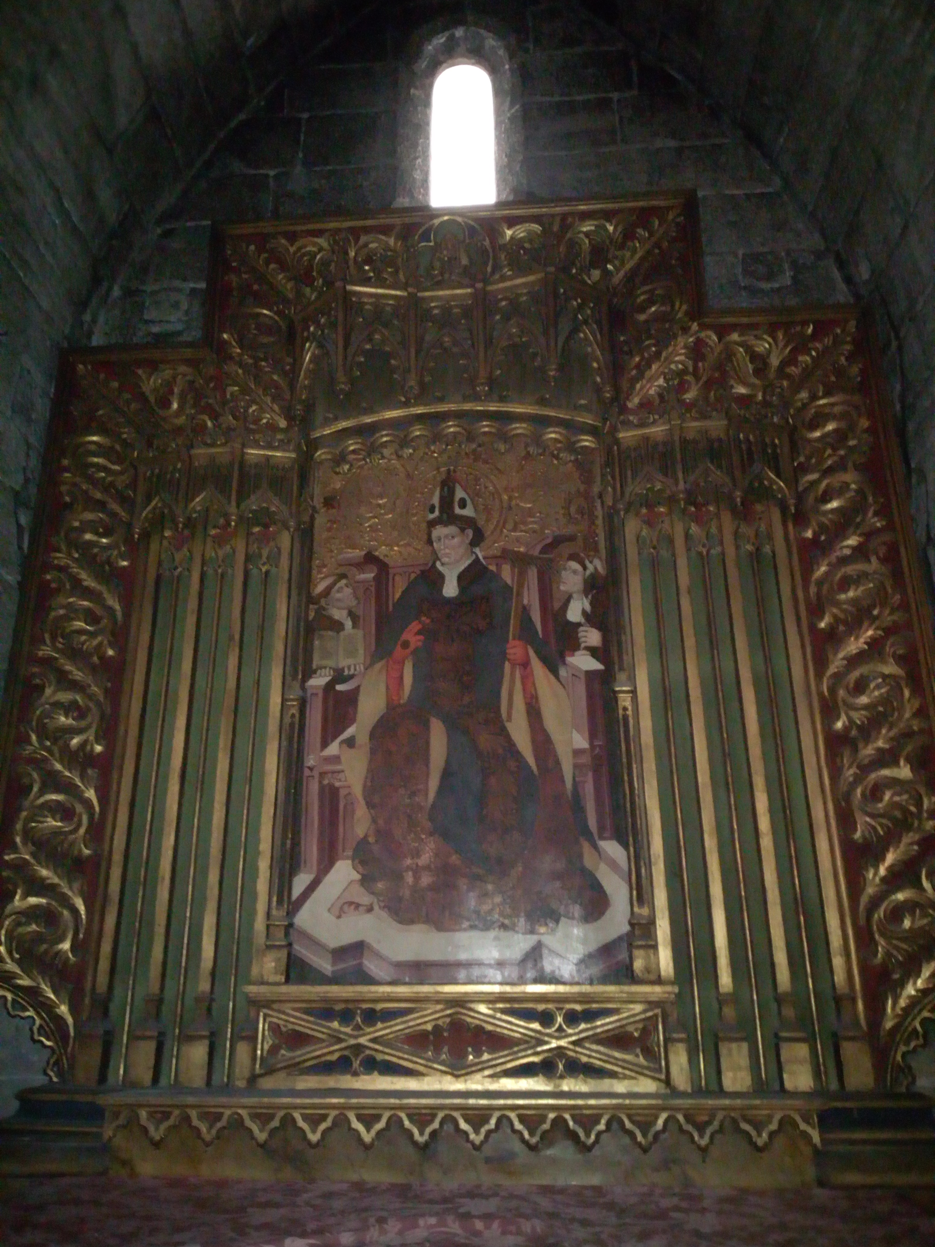 Taula pictòrica de Sant Blai, datada al 1450 i realitzada per Jaume Ferrer II.